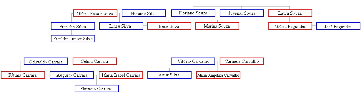 Árvore Genealógica dos personagens de A Grande Família até 2011